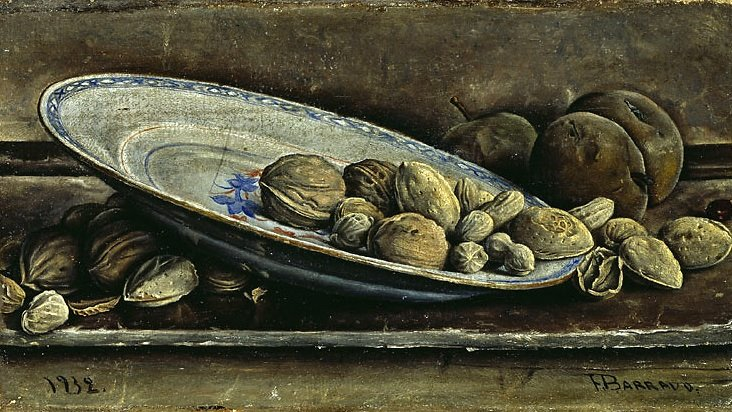 "Les casse-dents"